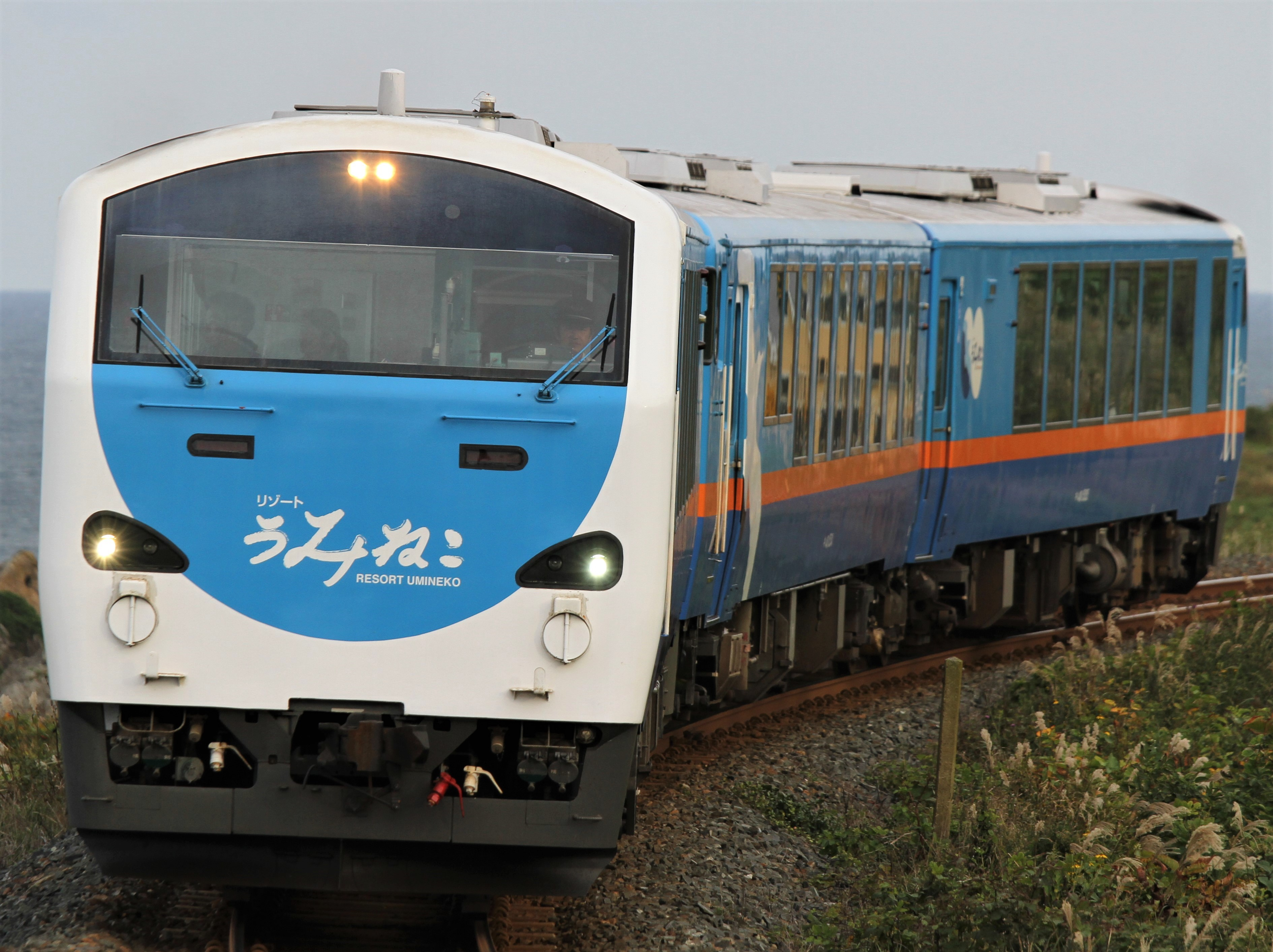 キハ48